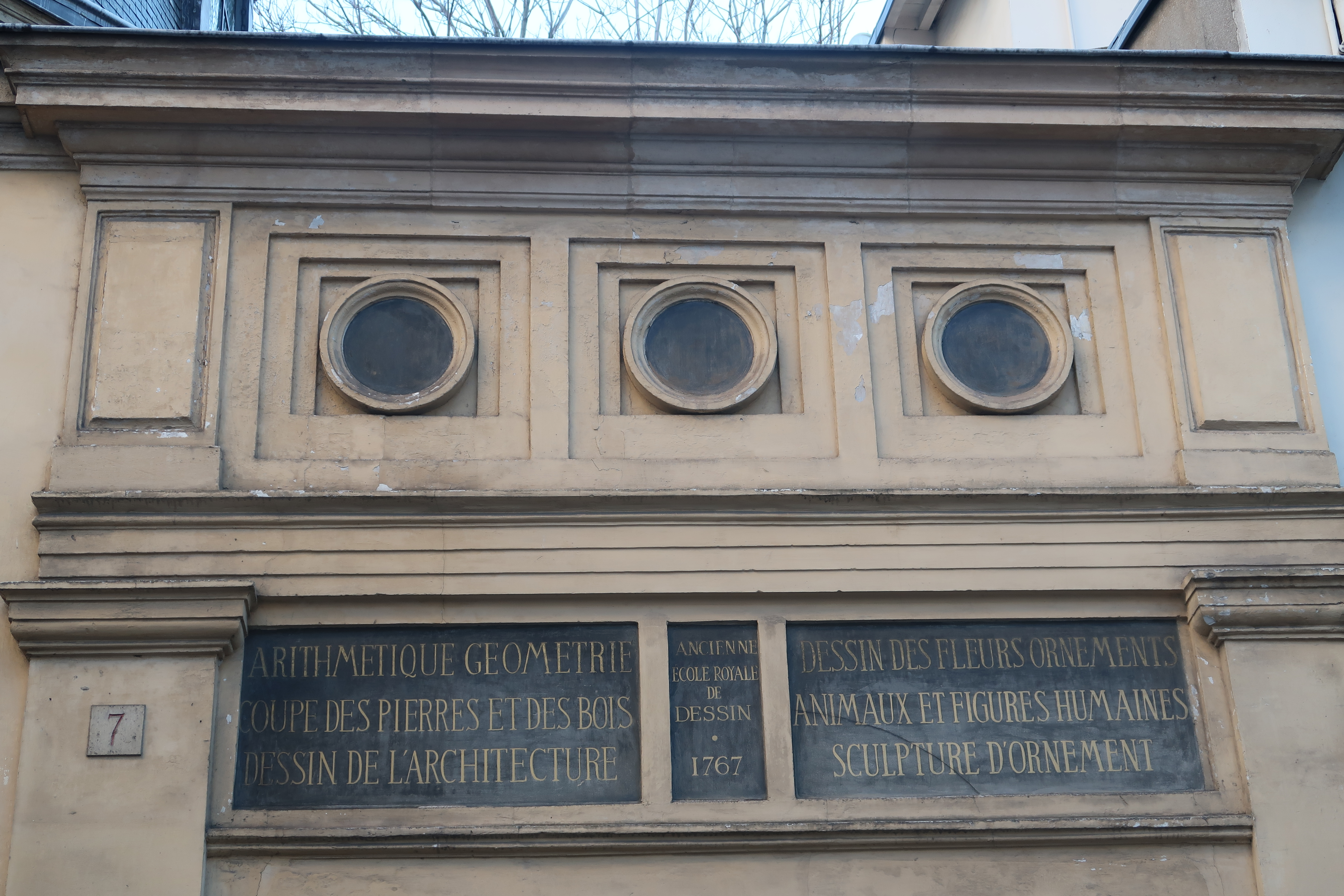 Plaque au-dessus de la porte cochère de l'ancienne École Royale de Dessin, fondée en 1766, ouverte en 1767 et installée environ dix ans plus tard ici dans l'ancien théâtre anatomique dit de Saint-Côme, alors situé rue des Cordeliers, actuelles 5/7, rue de l'École de Médecine, VIe arrondissement, Paris, France.